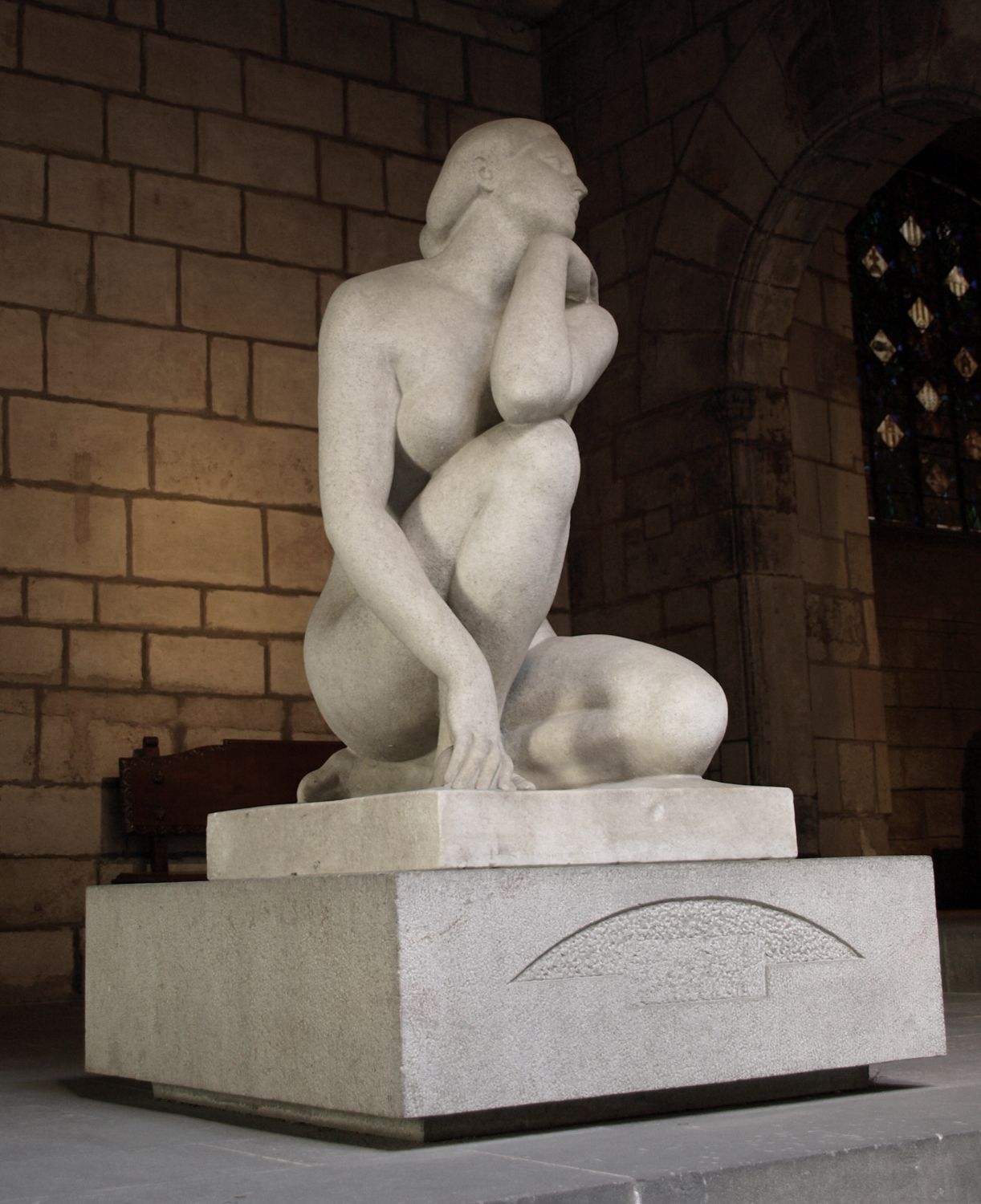 "La Diosa", de Josep Clarà (Ayuntamiento de Barcelona)